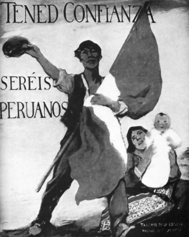 Cartel patriótico dedicado a los heroicos peruanos de Tacna y Arica que sufrían los estragos de la ocupación chilena. Década de 1920.